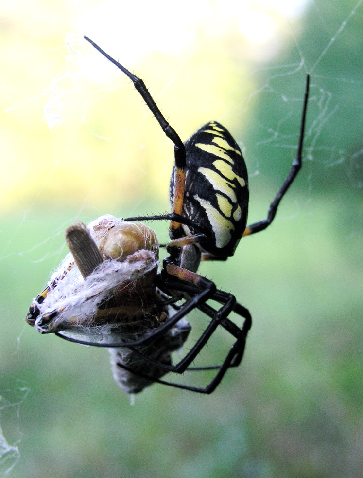 Orb Weaver (Argiope aurantia) spider drinking prey.